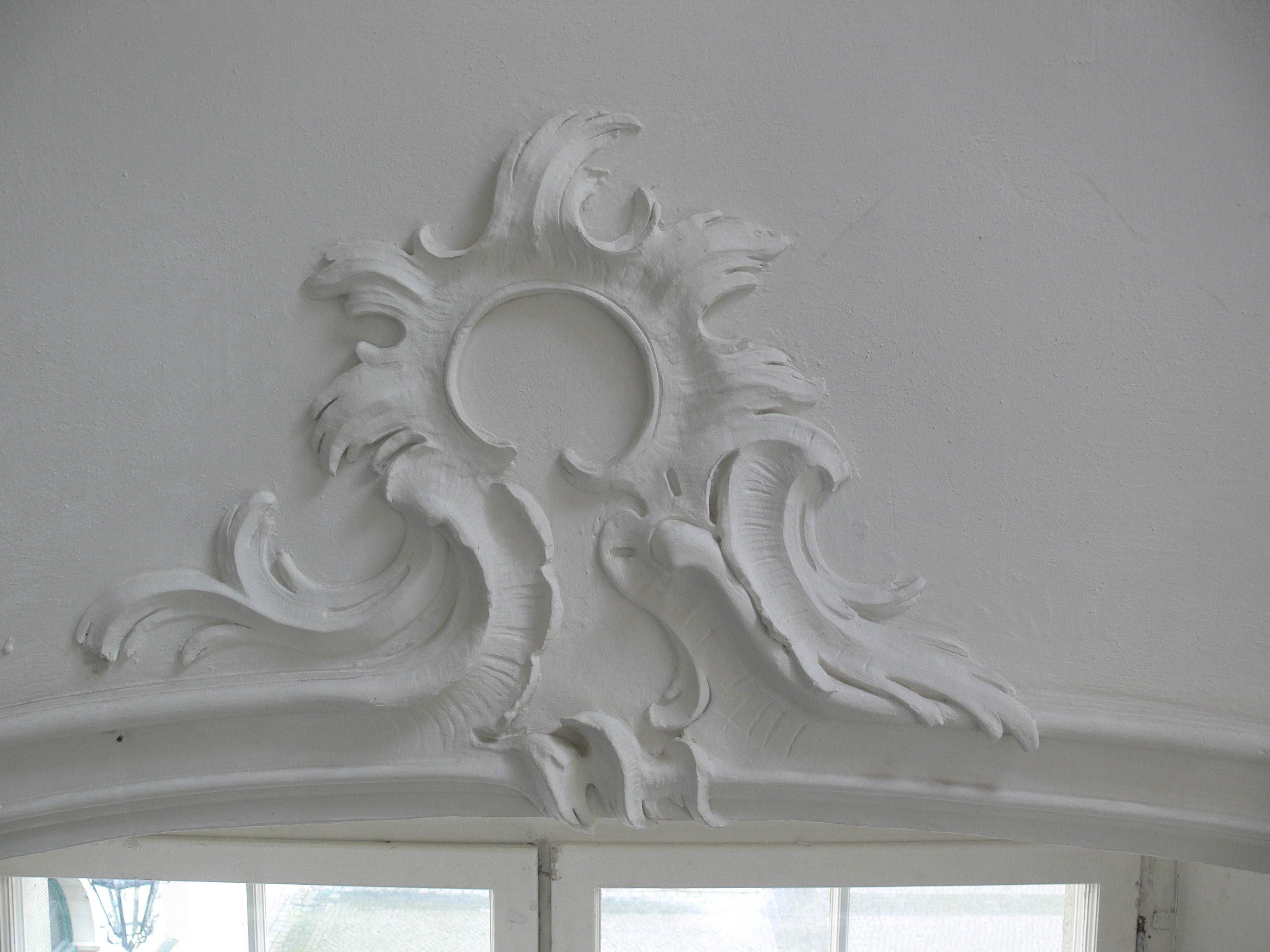 Neues Schloss, Tettnang, Bodenseekreis Treppenhaus, Stuckdetail